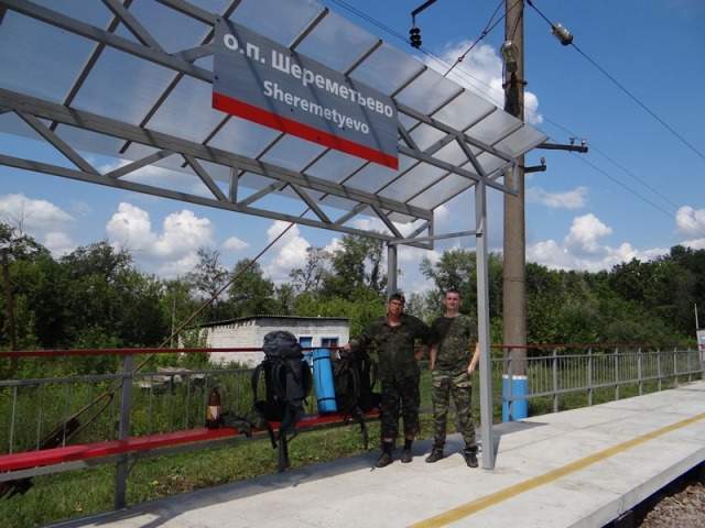 Станция Шереметьево